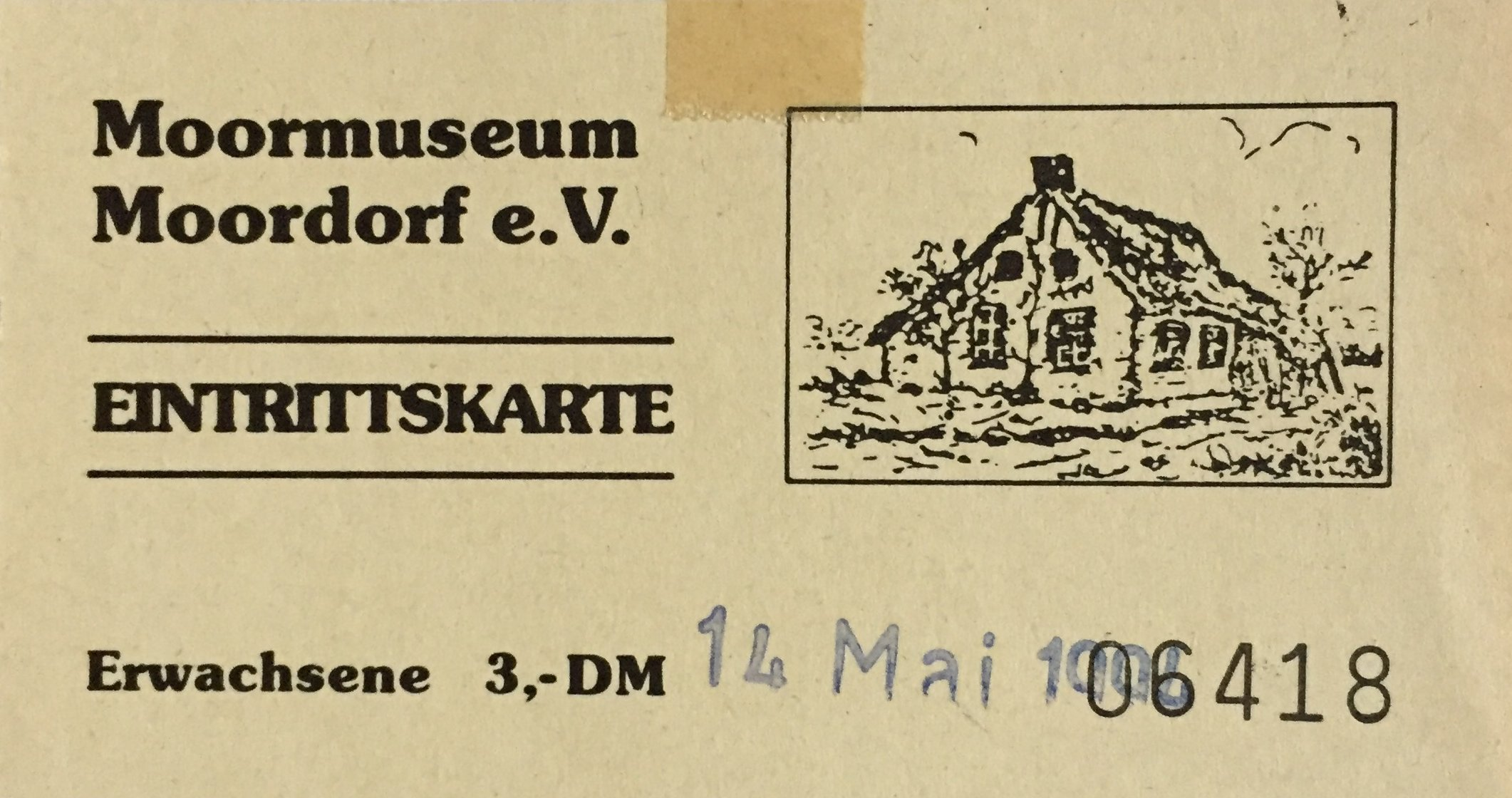 Moormuseum Moordorf - Eintrittskarte 1994